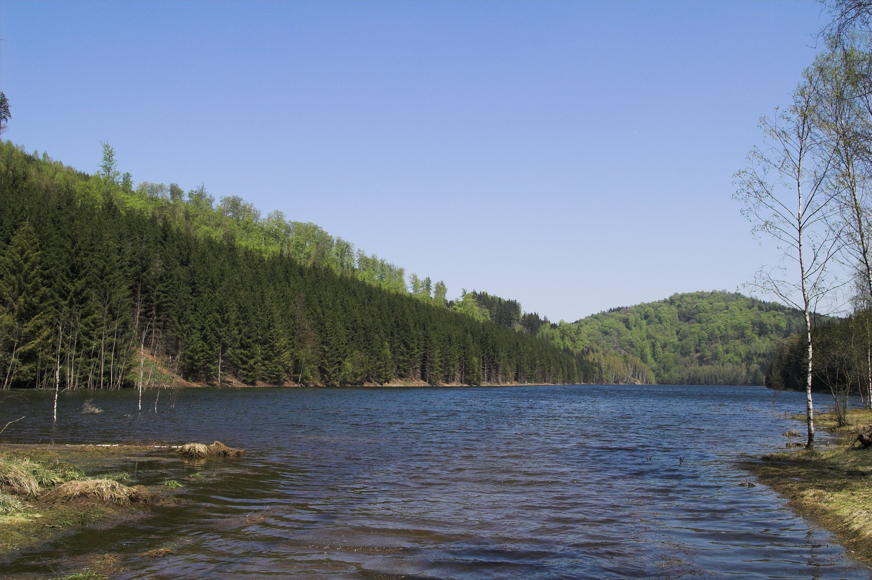 Einmündung der Grane in die Granetalsperre